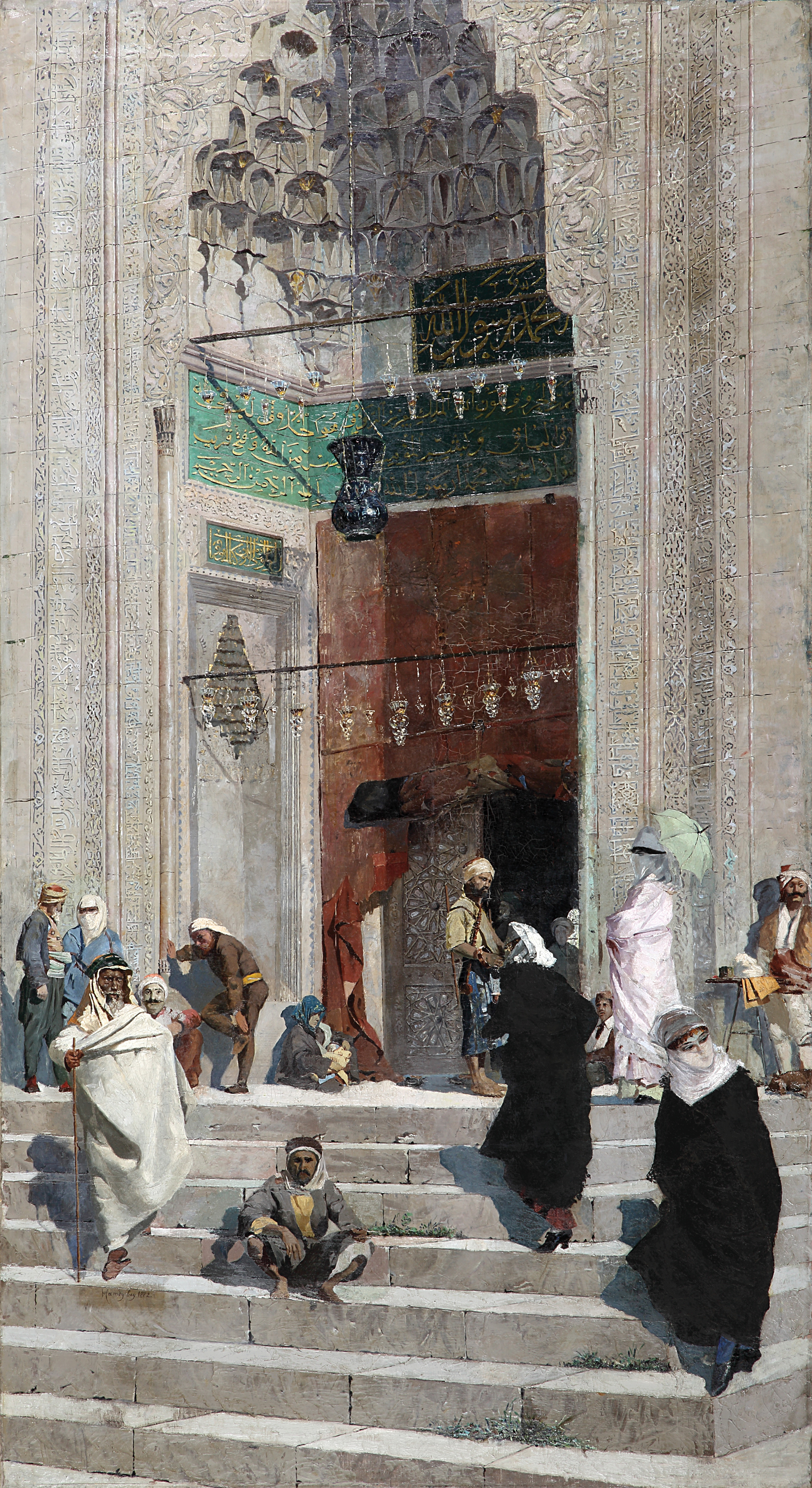 Antik A.Ş.'nin gerçekleştirdiği müzayedede Osman Hamdi Bey'in "Yeşil Cami Önü" tablosu KDV dahil toplam 13.509.000 TL. fiyata satılarak Türkiye'de satılan en değerli sanat eseri rekorunu kırdı.